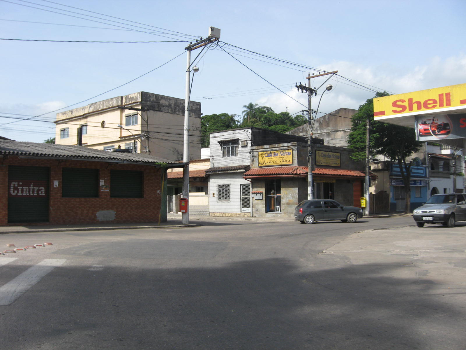 Vista do Centro de Magé, RJ, Brasil